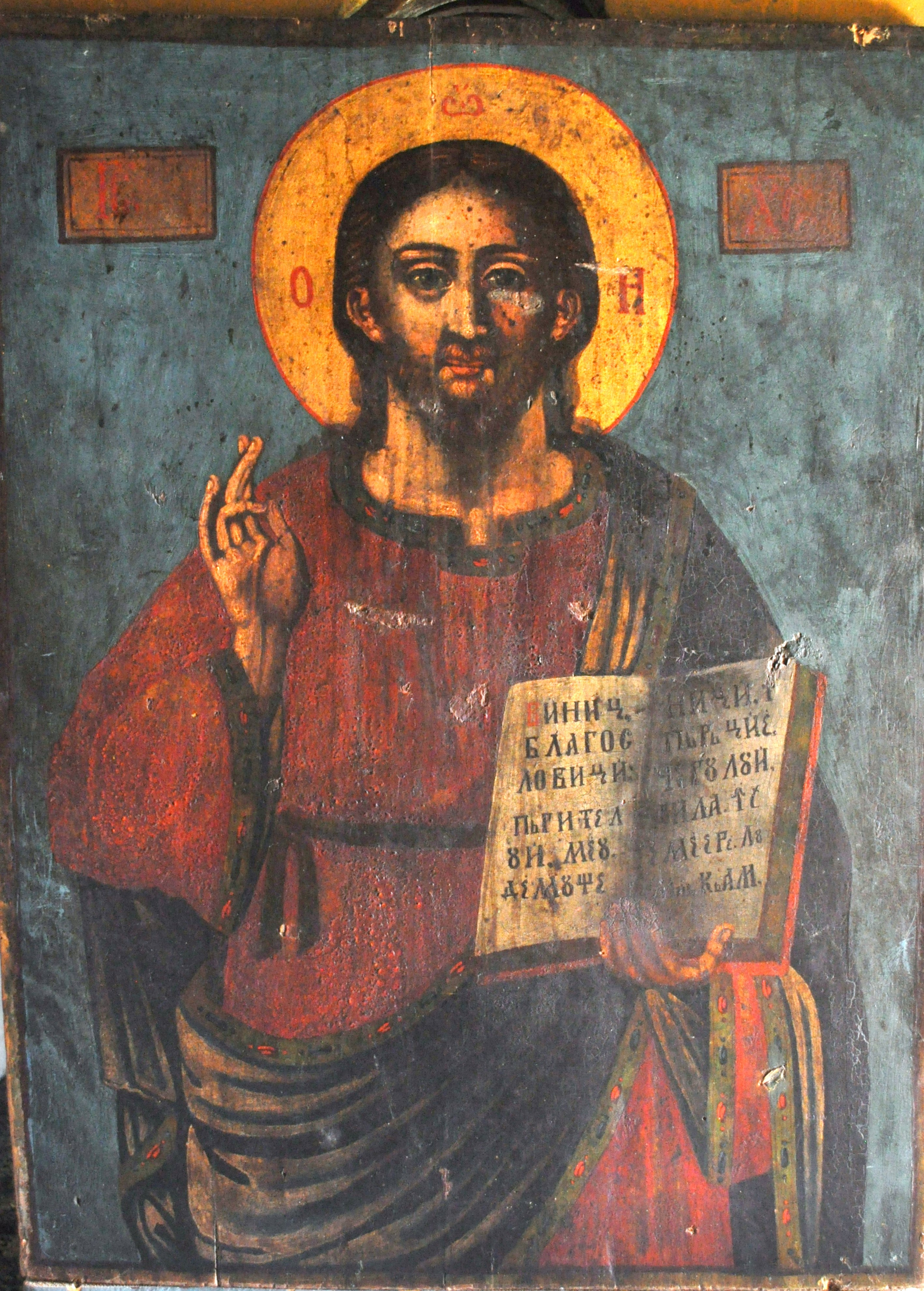 Biserica de lemn „Cuvioasa Paraschiva” din satul Valea Sării, județul Vrancea